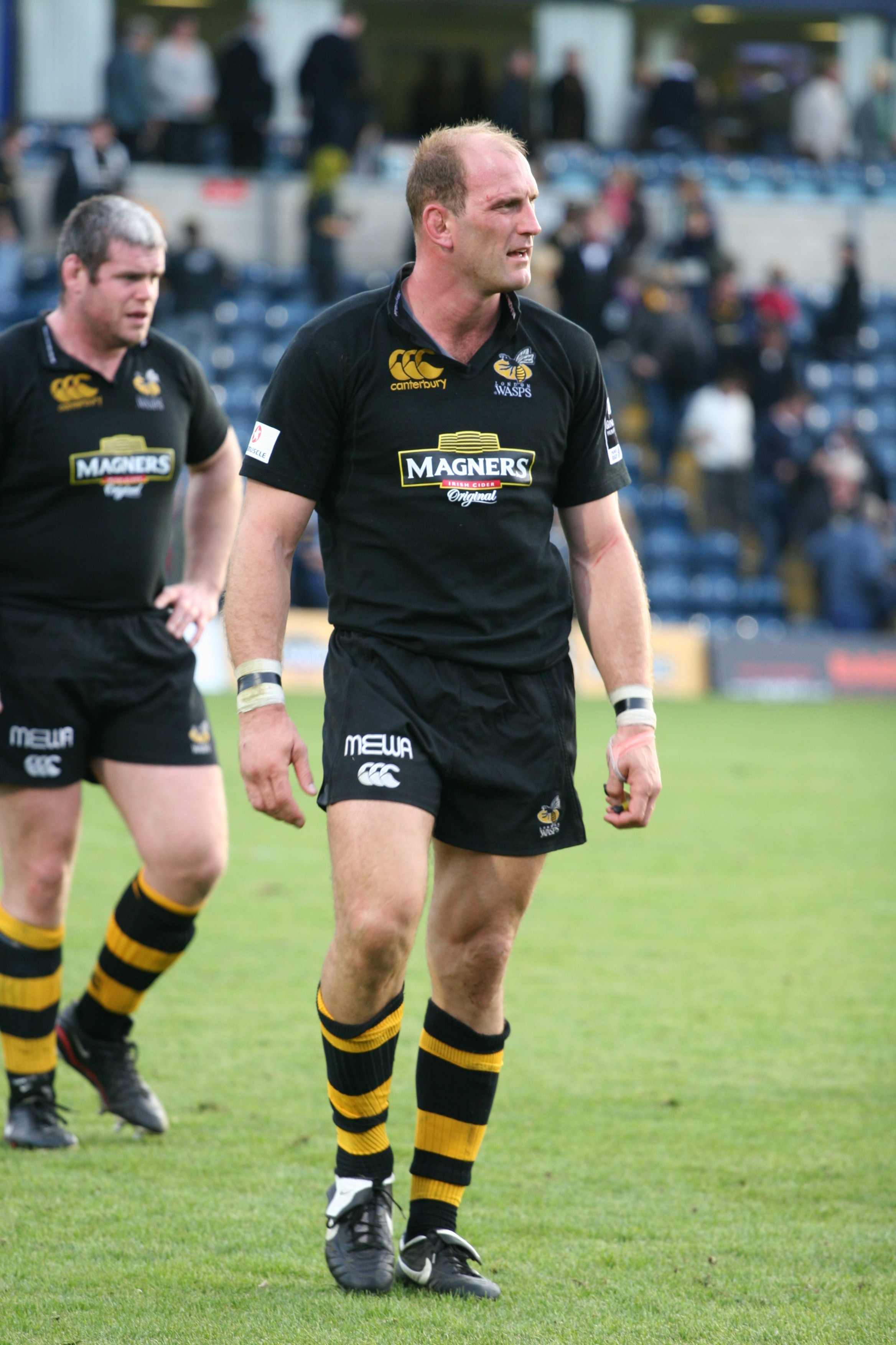 Lawrence Dallaglio 3ème ligne des London Wasps